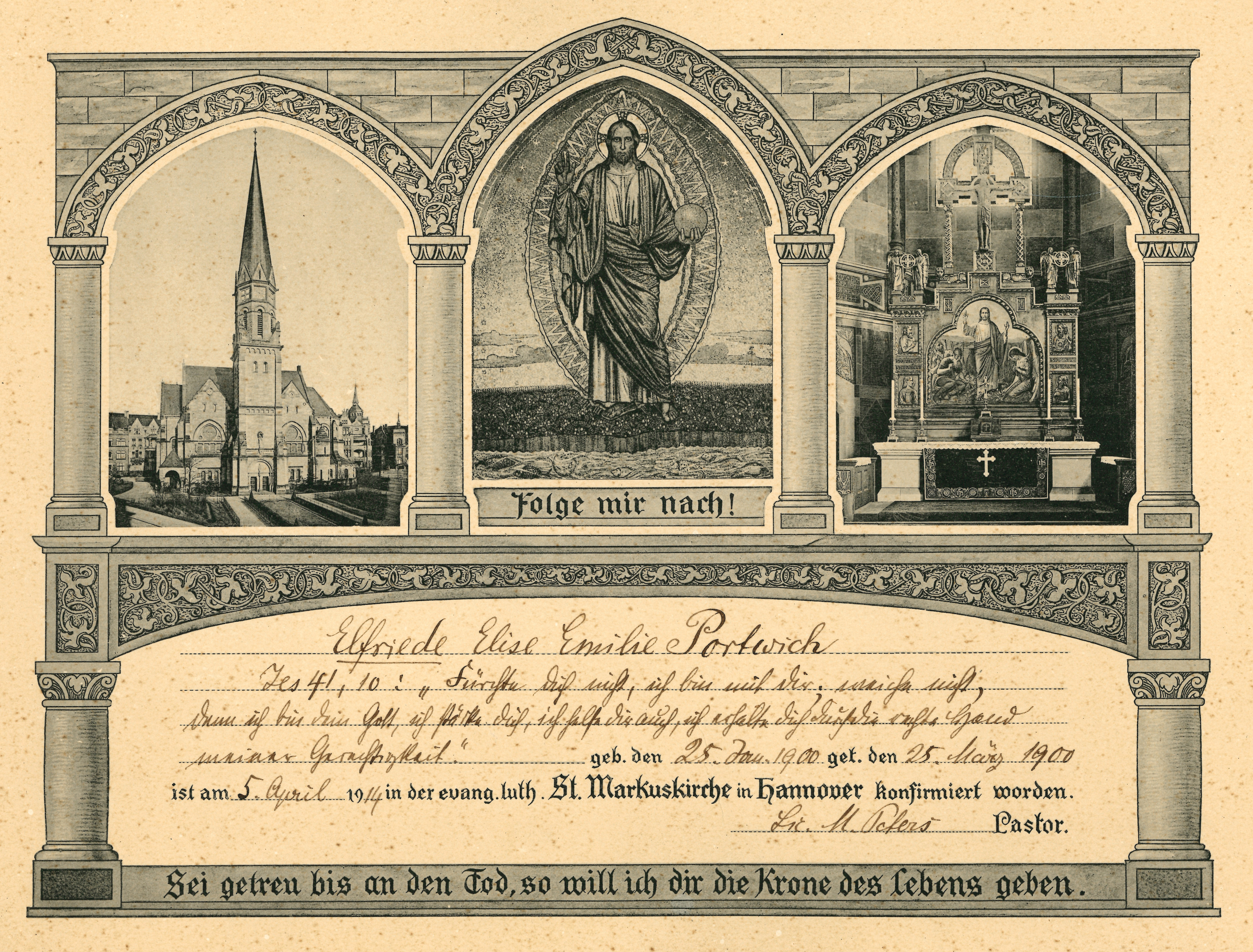 Ehemals gerahmter Karton mit einem nach 1907 im Lichtdruck sowie mit zusätzlich aufgedruckten einzelnen Linien vervielfältigten Vordruckes zur Konfirmation in der St. Markuskirche in Hannover. Unter den drei Bildfeldern, in denen (von links) die Kirche mit ihrer ehemaligen südlichen Vorplatzgestaltung und dahinter die Bebauung der Straße An der Markuskirche zu sehen ist, in der Mitte das von Kaiser Wilhelm II. gestiteten Jesus-Mosaiks und rechts daneben der durch die Luftangriffe auf Hannover im Zweiten Weltkrieg zerstörte Altar, findet sich handschriftlich „Elfriede Elise Emilie Portwich [... ist am] 15. April [19]14 [in der evang. luth. St. Markuskirche in Hannover konfirmiert worden.“ Darunter findet sich die Unterschrift des Pastors ... Peters ...